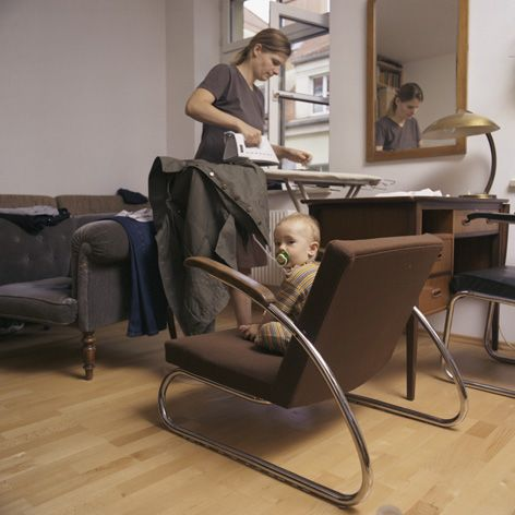 Mutter und Tochter, Hausarbeit, Kinderbetreuung